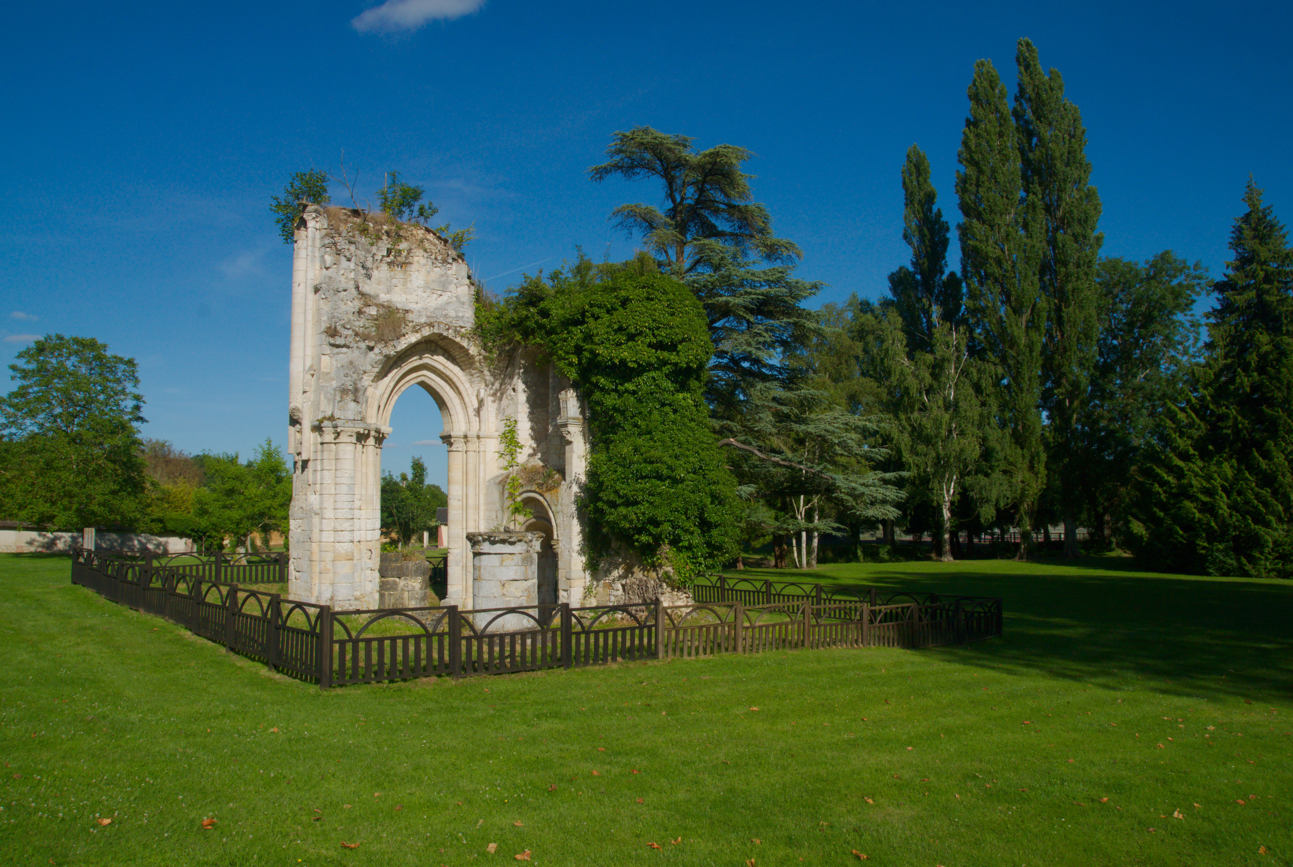 Ruines de l'Abbaye de la Noë, La Bonneville-sur-Iton, Eure, France